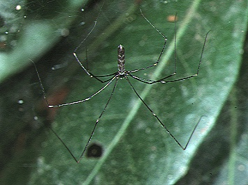 female Pholcus nagasakiensis from Okinawa.